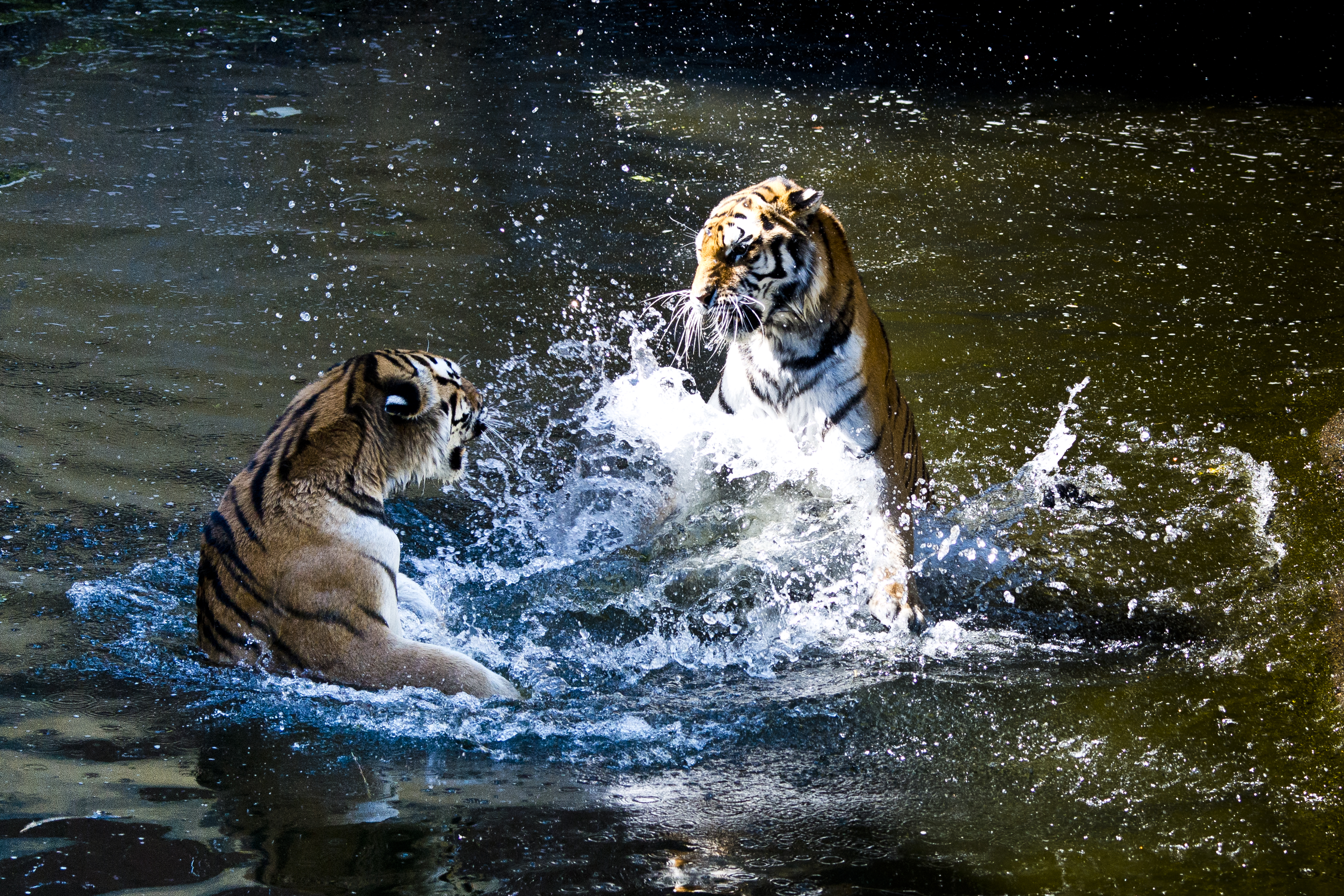 Kolmårdens Djurpark 2015, Tigrar bråkar